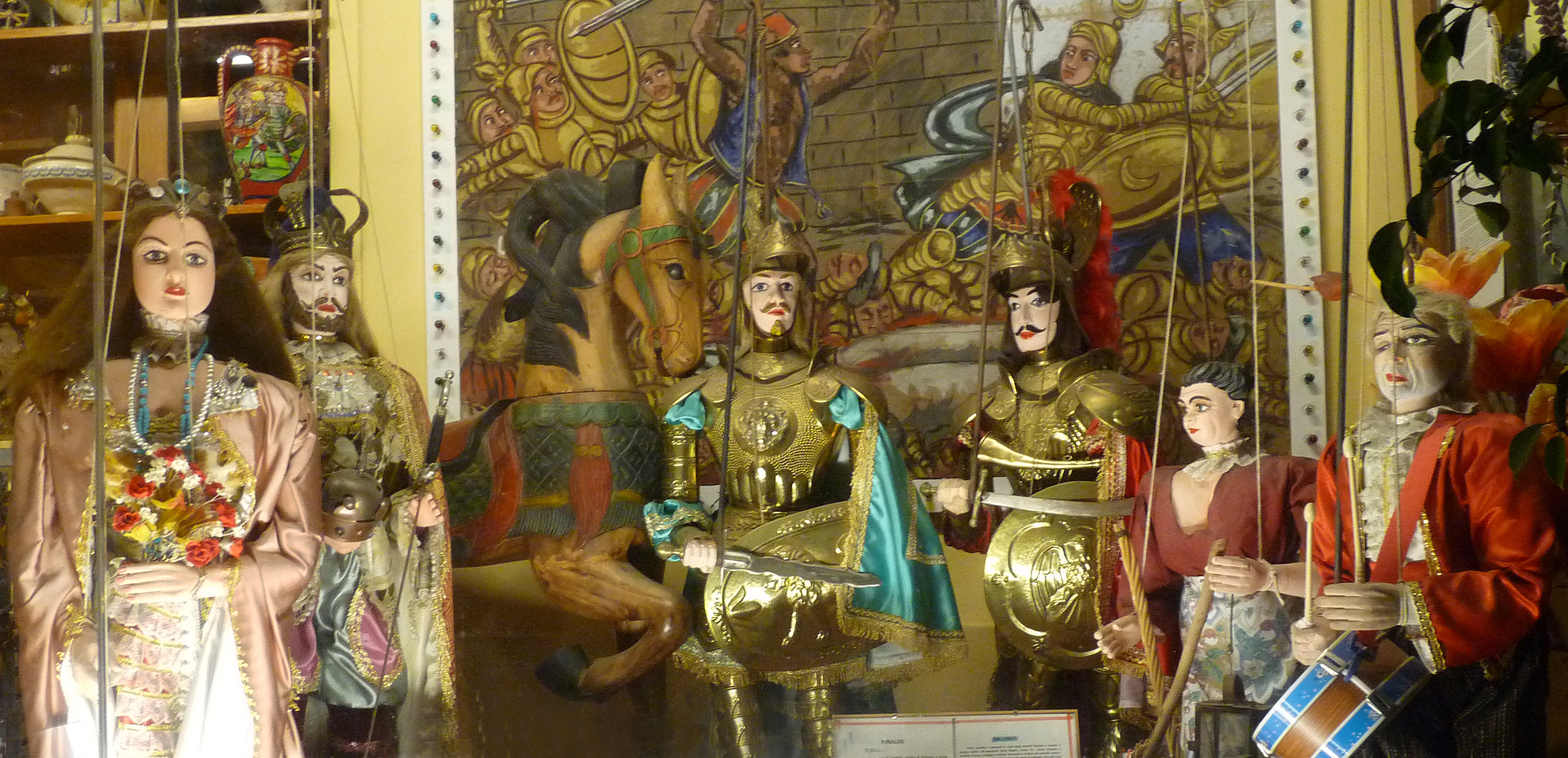 Personnages du théâtre de marionnettes sicilien (Musée ethnographique éolien, Lipari)